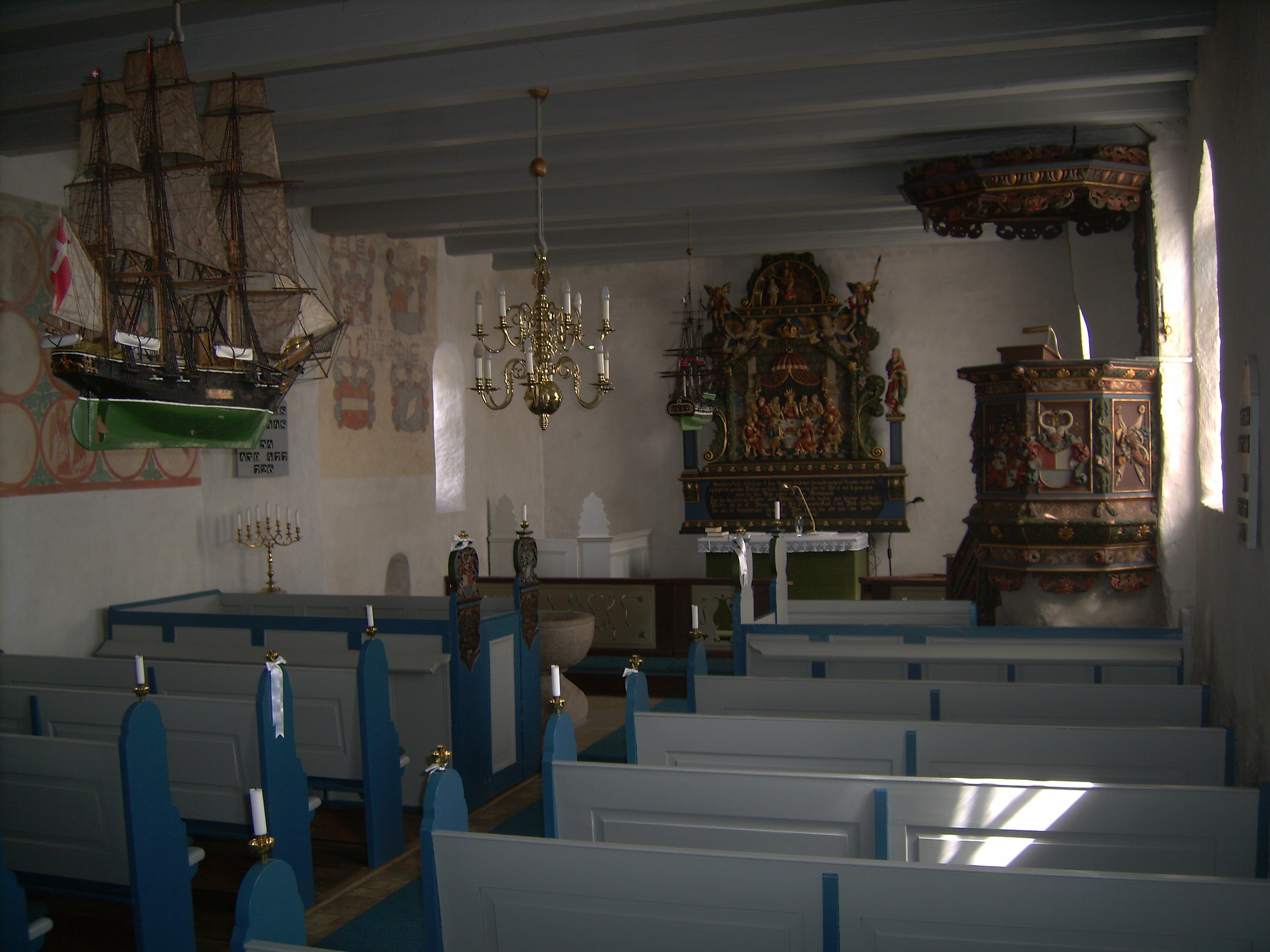 Udby Kirke,Rougsø Kommune, inside